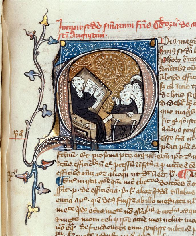 Reroduction du feuillet 124 du manuscrit 151 de la Bibliothèque municipale de Troyes